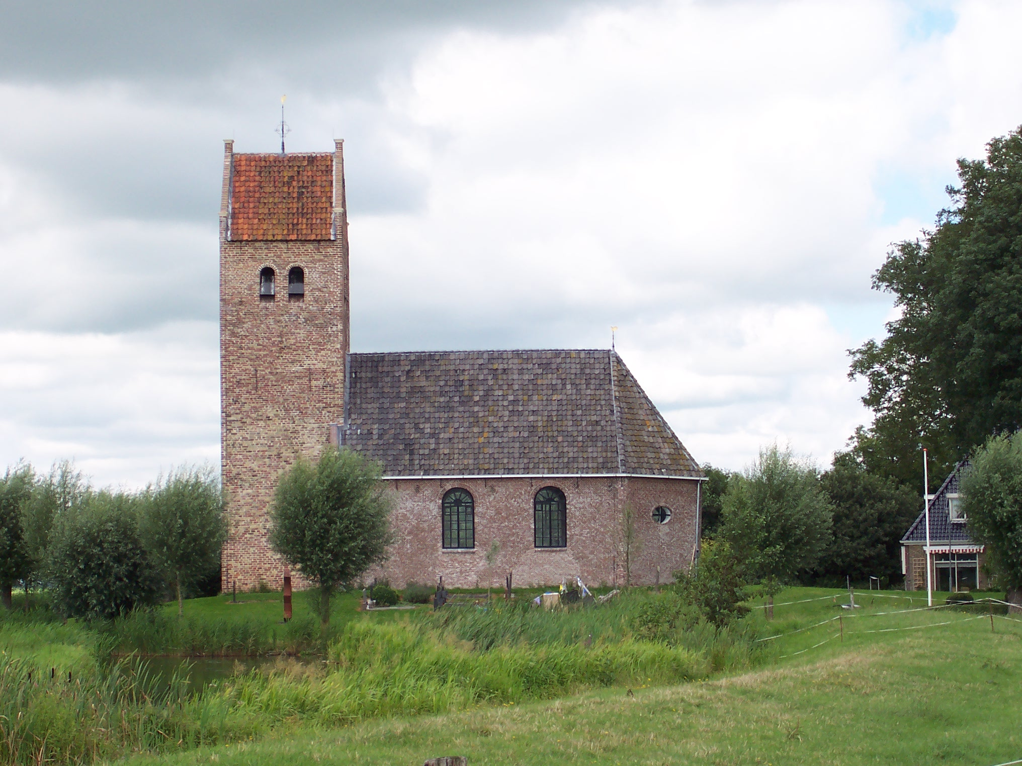 Westhim, Bartolomeustsjerke